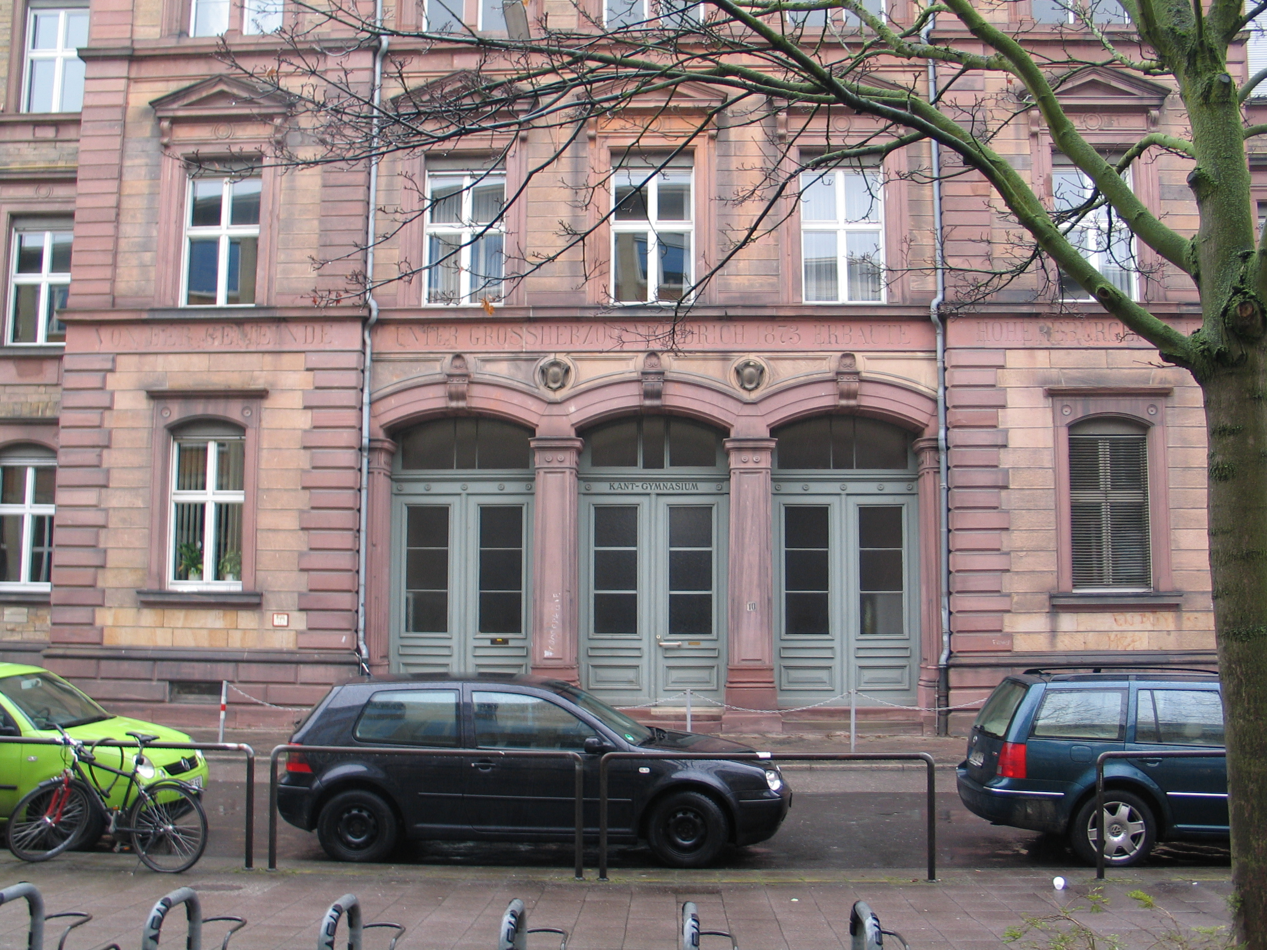 Kant-Gymnasium Karlsruhe